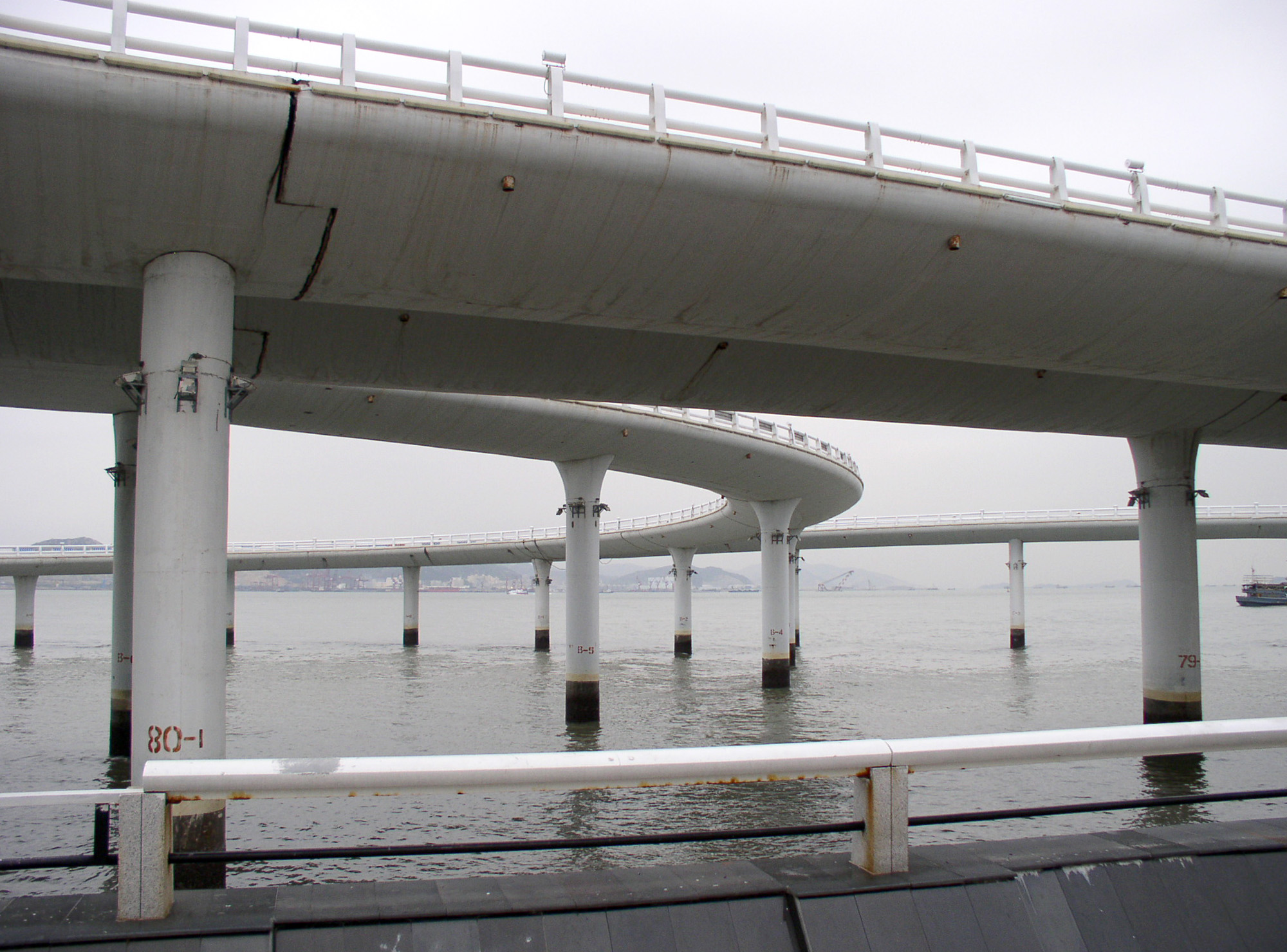 Yanwu Bridge in Xiamen, auf der die Küstenstraße hier auf einer Länge von mehreren Kilometern parallel zum Ufer über dem Meer verläuft.